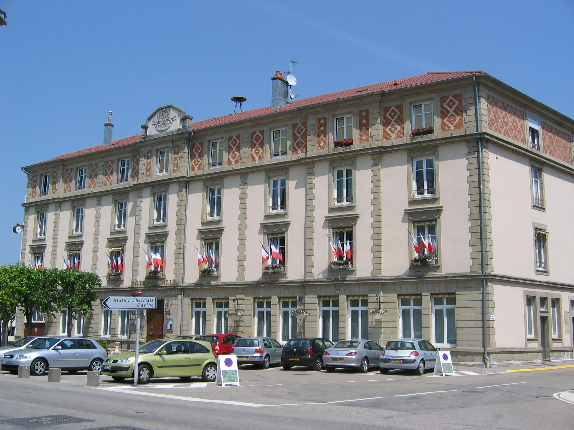 Mairie de Contrexéville, Vosges, Lorraine, France